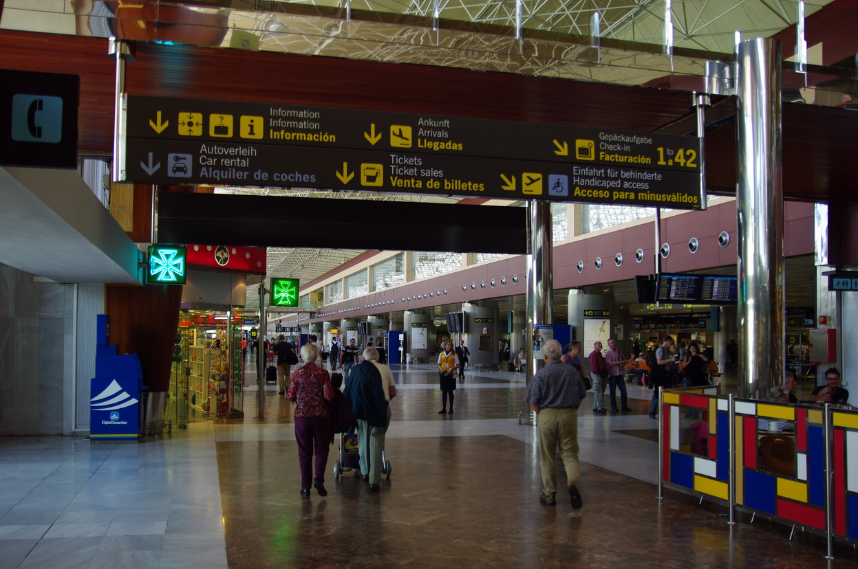 Flughafen Teneriffa-Süd, Abflughalle